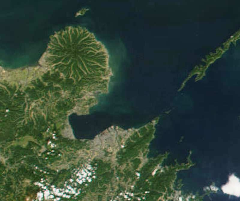 Beppu Gulf, Oita, Japan - 別府湾（大分県）